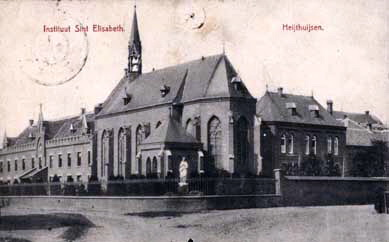 Kloostergebouwen en kloosterkapel van het Sint-Elisabethklooster in Heythuysen (Limburg) omstreeks 1905. Het klooster is het moederhuis van de Congregatie van de Zusters Franciscanessen van Heythuysen. Fotocollectie RHCL Maastricht, collectie Dr. J.W.H. Goossens, nr: CG 500-078.